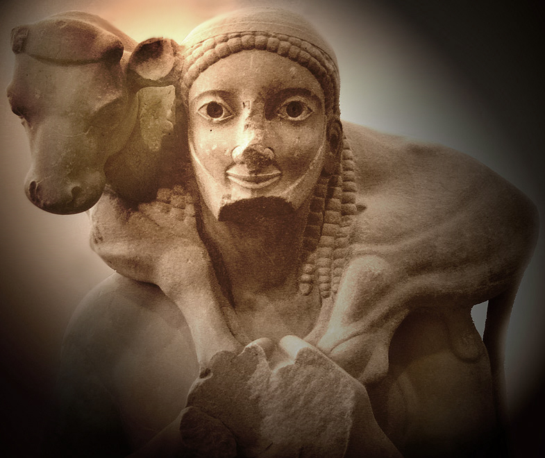 Statue d'un jeune homme barbu. Il est vêtu d'un himation court et il porte un veau sur ses épaules pour le sacrifier à la déesse. L'inscription fragmentaire sur la base conserve le nom du dédicant de cette statue votive : [Rh]ombos. Détail.